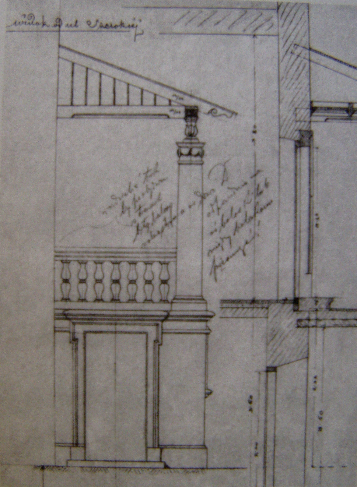 Projekt loggi przy zachodniej elewacji Starej Synagogi w Krakowie (1904)